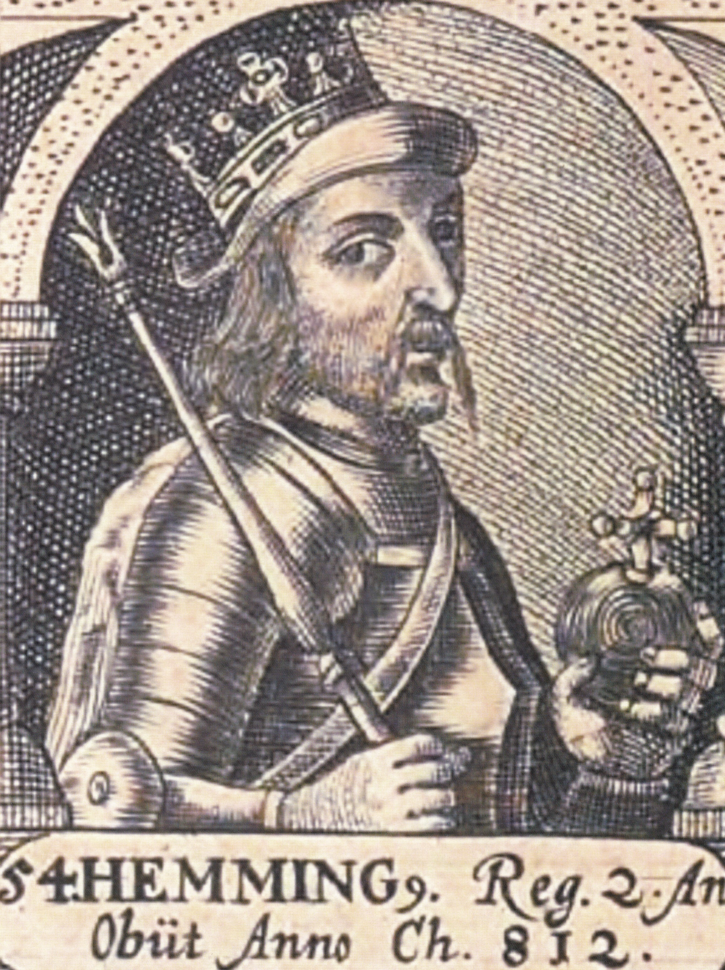 Mindre udsnit forestillende den danske konge Hemming fra "Veræ effigies regum omnium qvi a primo Dan usqe Christianum IV modo regnantem imperii Danici gloria eminuerunt" udgivet i 1670 af Erico Olai Tormio. Hemming dansk konge mellem 810 og 812. I 811 indgik han den første dokumenterede freds- og grænseaftale med den frankiske kejser Karl den Store.